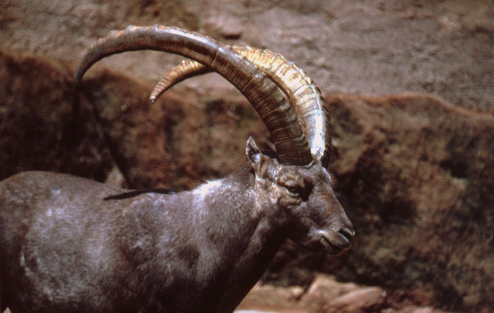 Capra ibex ibex, Ger:Alpensteinbock.